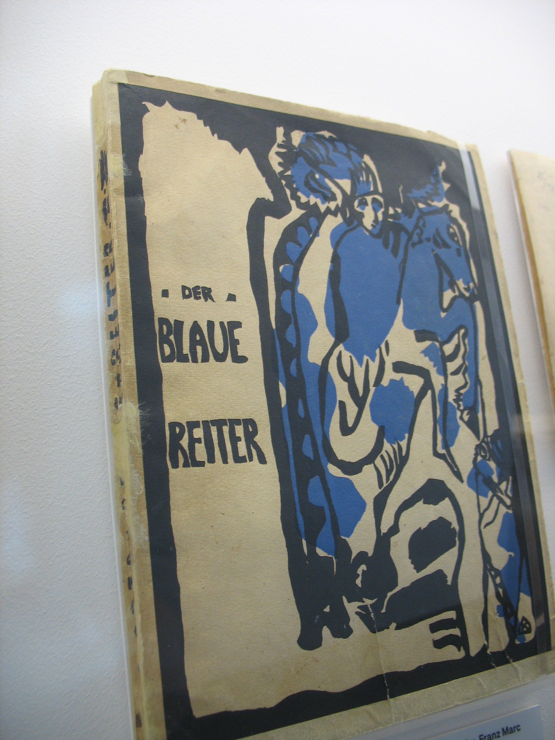 Almanach Der Blaue Reiter (1912), cover by Wassily Kandinsky